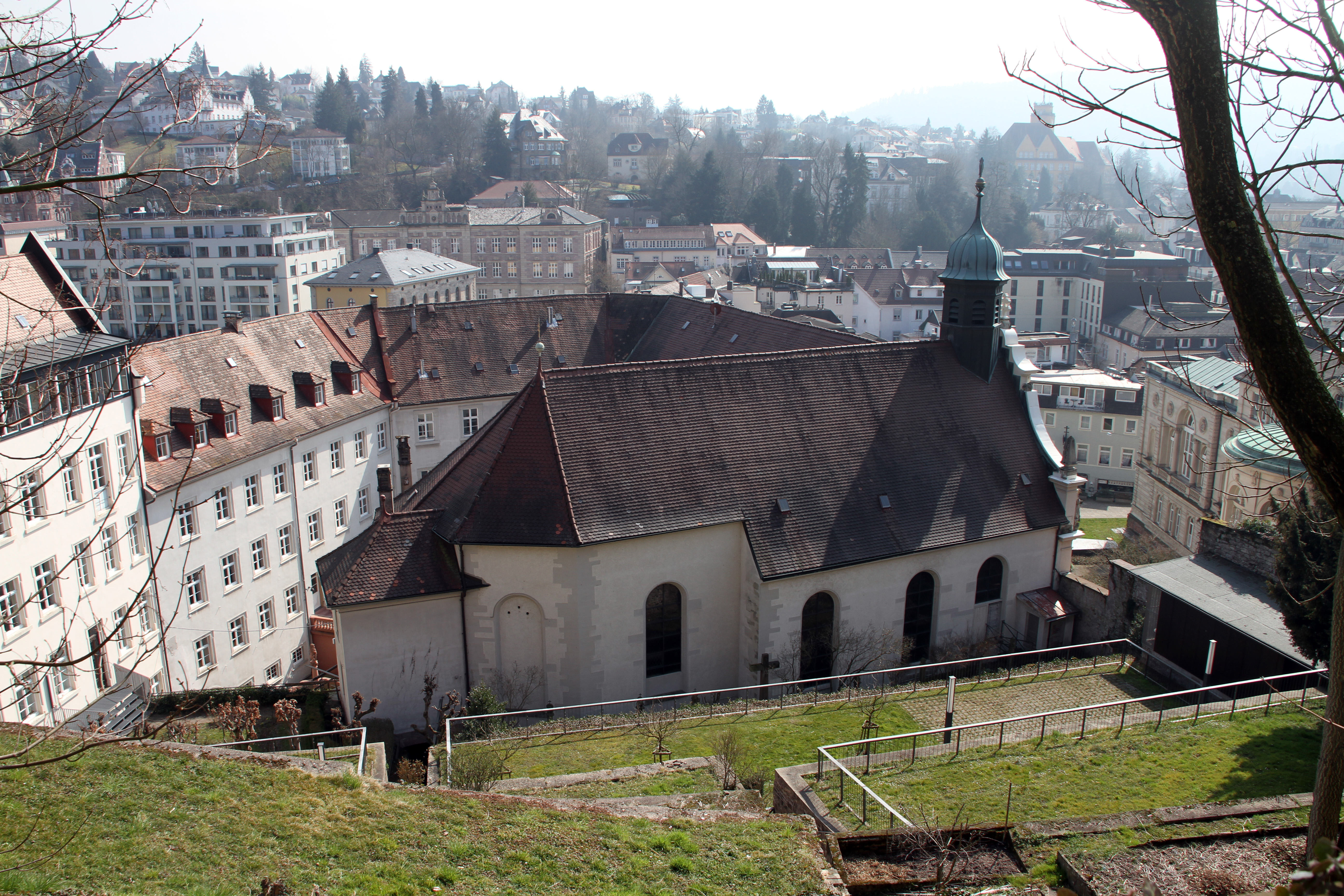 Kloster vom Heiligen Grab in Baden-Baden.